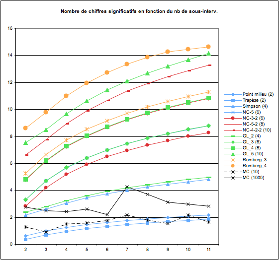 Résultats effectifs de l'intégration numérique de x sin(x^2) sur [0, π^0.5]. Valeurs indiquées : Log(erreur) en fonction du nombre de sous-intervalles de la discrétisation.